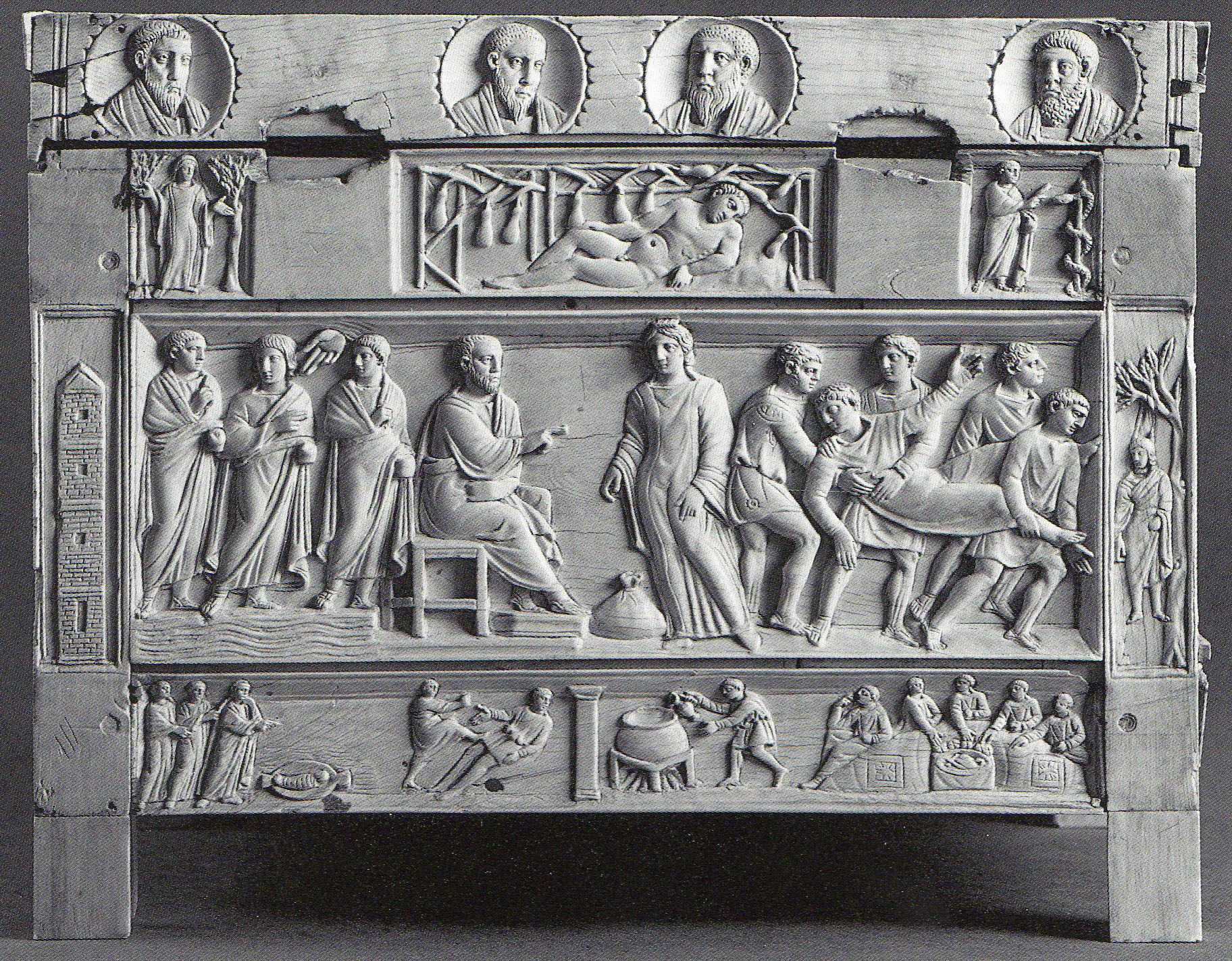 Lipsanoteca di Brescia (retro)